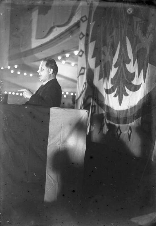 Riesenkundgebung der "Eisernen Front" des deutschen republikanischen Reichsbanners im Sportpalast in Berlin ! Der deutsche Dichter Fritz von Unruh während seiner Ansprache.